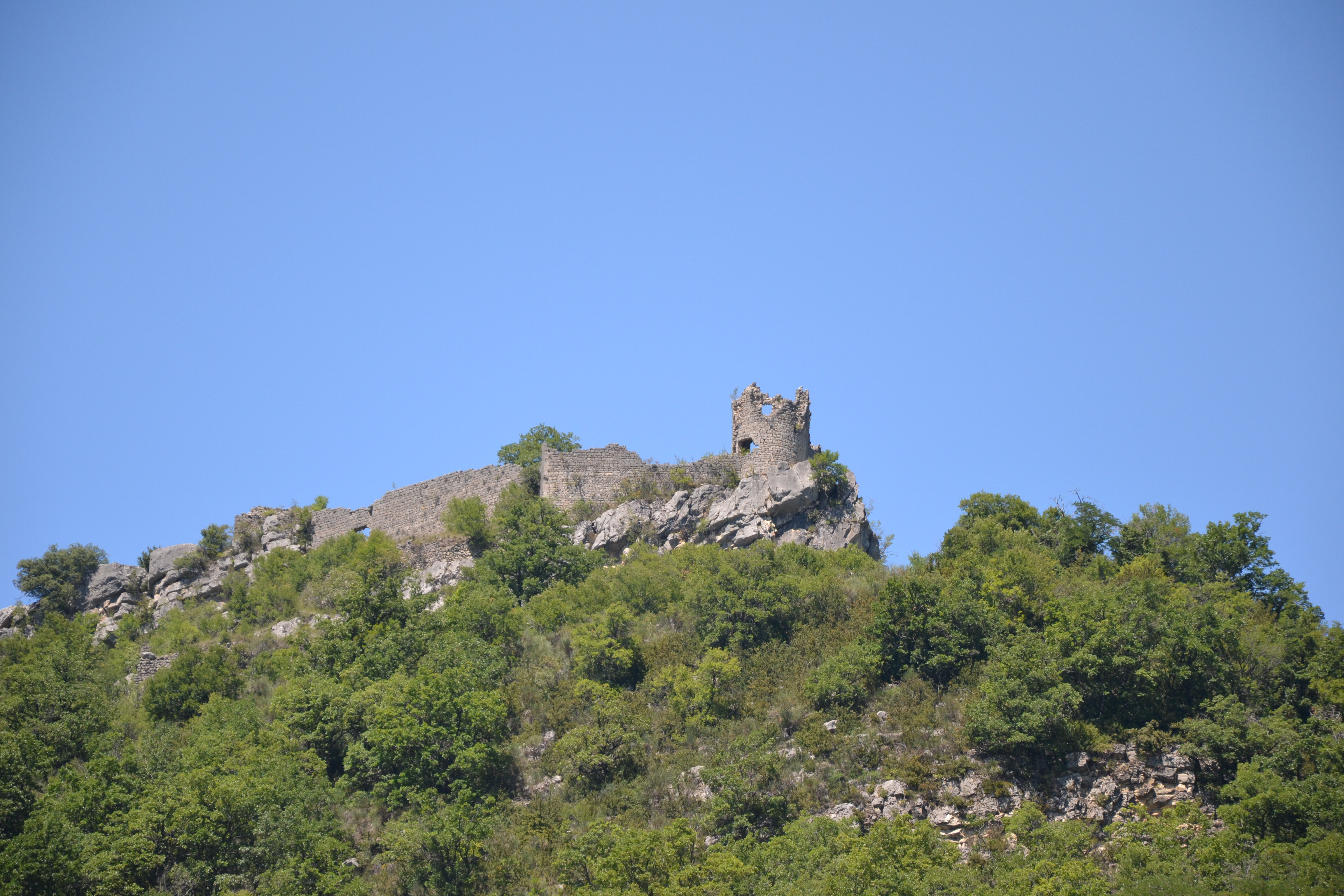 Chateau de Cornillon-sur-l'Oule